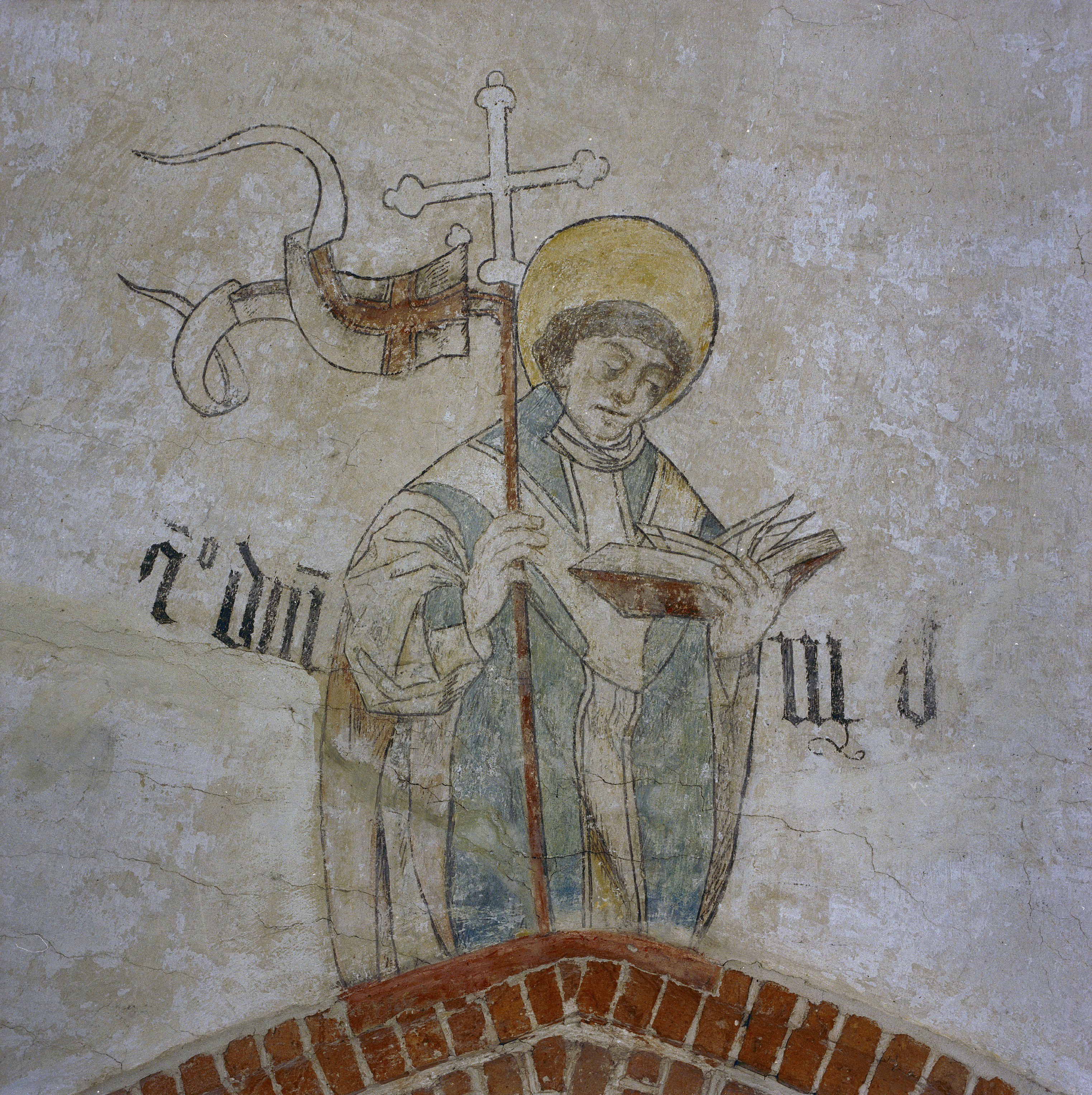 NEDERLANDS HERVORMDE KERK (GROTE- OF SINT LEBUINUSKERK): INTERIEUR, HOOFDBEUK, WESTZIJDE, GEWELFSCHILDERING